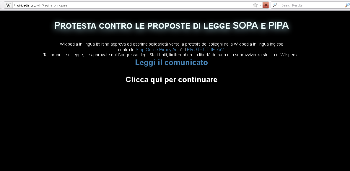 Capture d'écran de la page principale de Wikipédia en italien le 18 janvier 2012, affichant un message de solidarité avec le black-out de la Wikipédia anglophone.